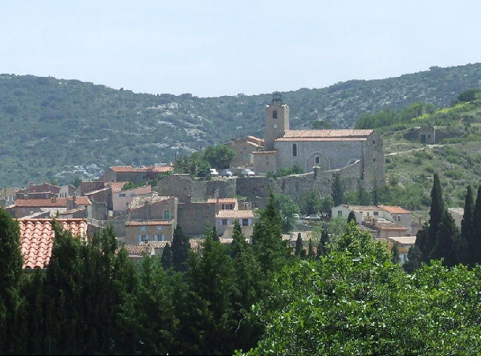 Village de Paziols Corbières dans l'Aude